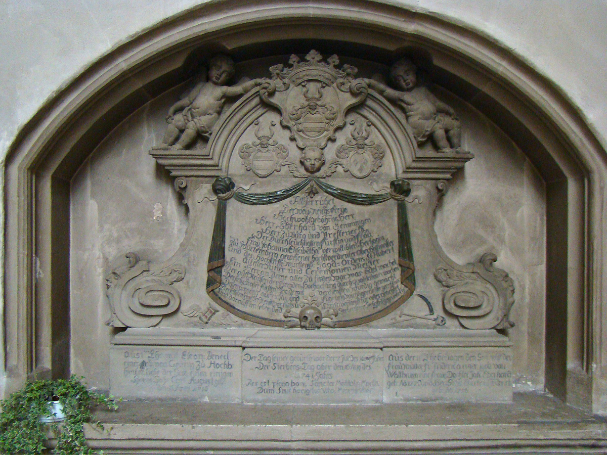 Historisches Grabmal (Eberhard von Gemmingen) in der Martinskirche in Kirchheim unter Teck